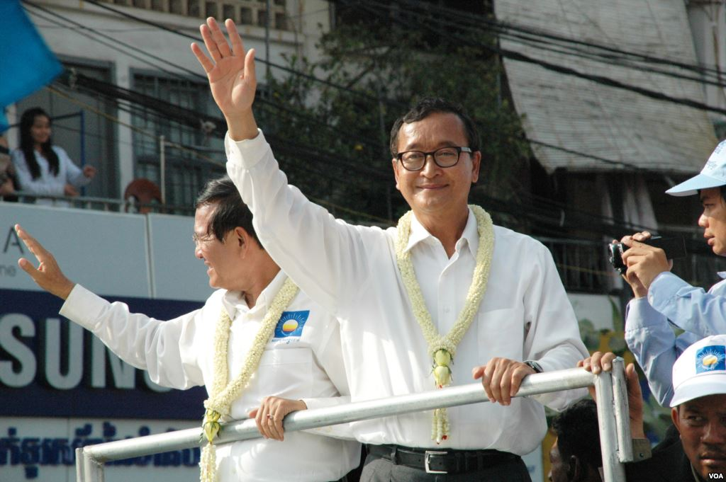 ភាសាខ្មែរ: លោក ​សម រង្ស៊ី (ស្តាំ) ប្រធាន​គណបក្ស​​សង្គ្រោះ​ជាតិ​ ​និង​​លោក កឹម សុខា អនុ​ប្រធាន​គណបក្ស លើក​ដៃ​គ្រវី​​ស្វាគម ដល់​ហ្វូង​មហាជន​នៅ​ក្នុង​ការដង្ហែតវ៉ា​មួយ នៅ​ថ្ងៃ​ទី​២៩​ខែធ្នូ ឆ្នាំ២០១៣។